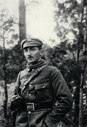 Józef Olszyna-Wilczyński w czasach służby w Legionach Polskich.